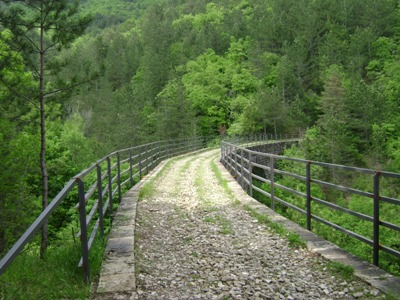 Vijadukt "Freski" na nekadašnjoj uskotračnoj pruzi "Parenzana"